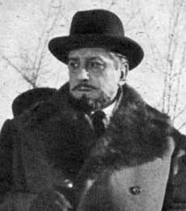 Giulio Stival e Renato Rascel ne "Il cappotto" (Lattuada, 1952).